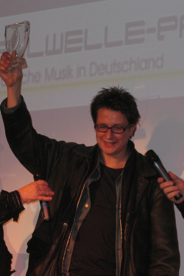 Der Musiker und Klangkünstler Spyra bei der „Schallwelle“-Preisverleihung in Dinslaken. März 2009